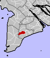 Gia Rai District, Bac Lieu Province, Vietnam.